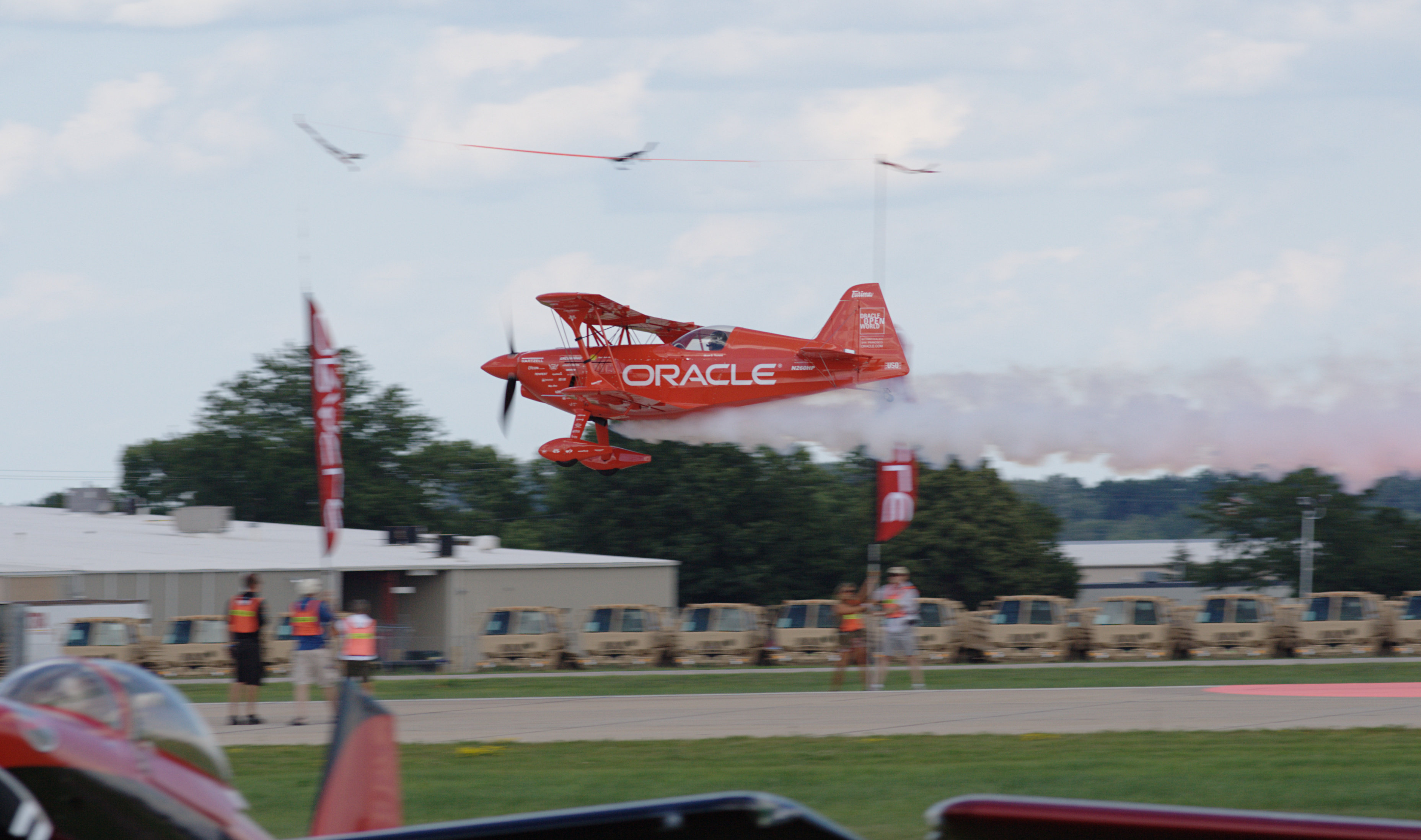 Tucker